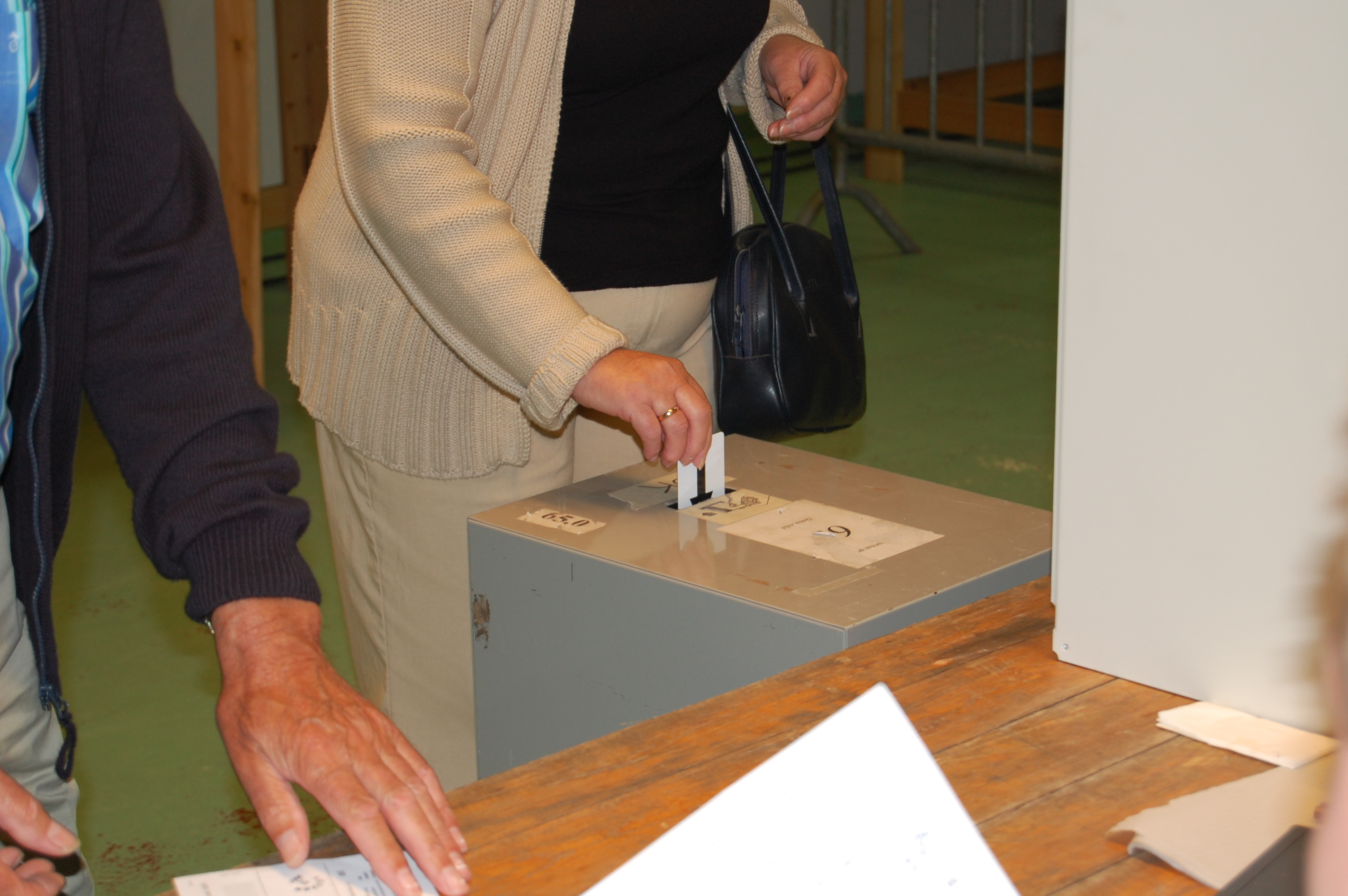 2007 federal elections in Belgium. Picture take in election bureau 65 in Wilsele, Leuven, Vlaams-Brabant, Belgium.